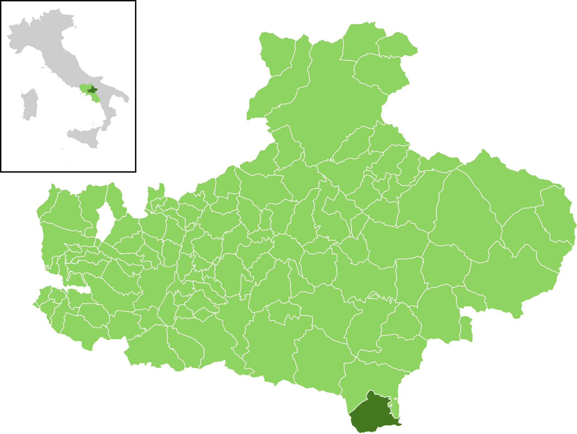 Posizione del comune all'interno della provincia di Avellino